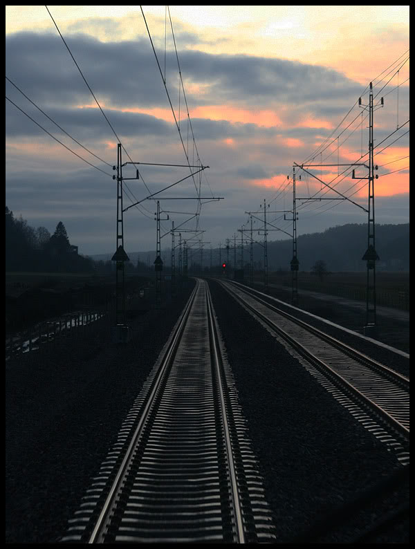 Ny järnväg mellan Älvängen och Bohus på (BJ) Norge/Vänerbanan